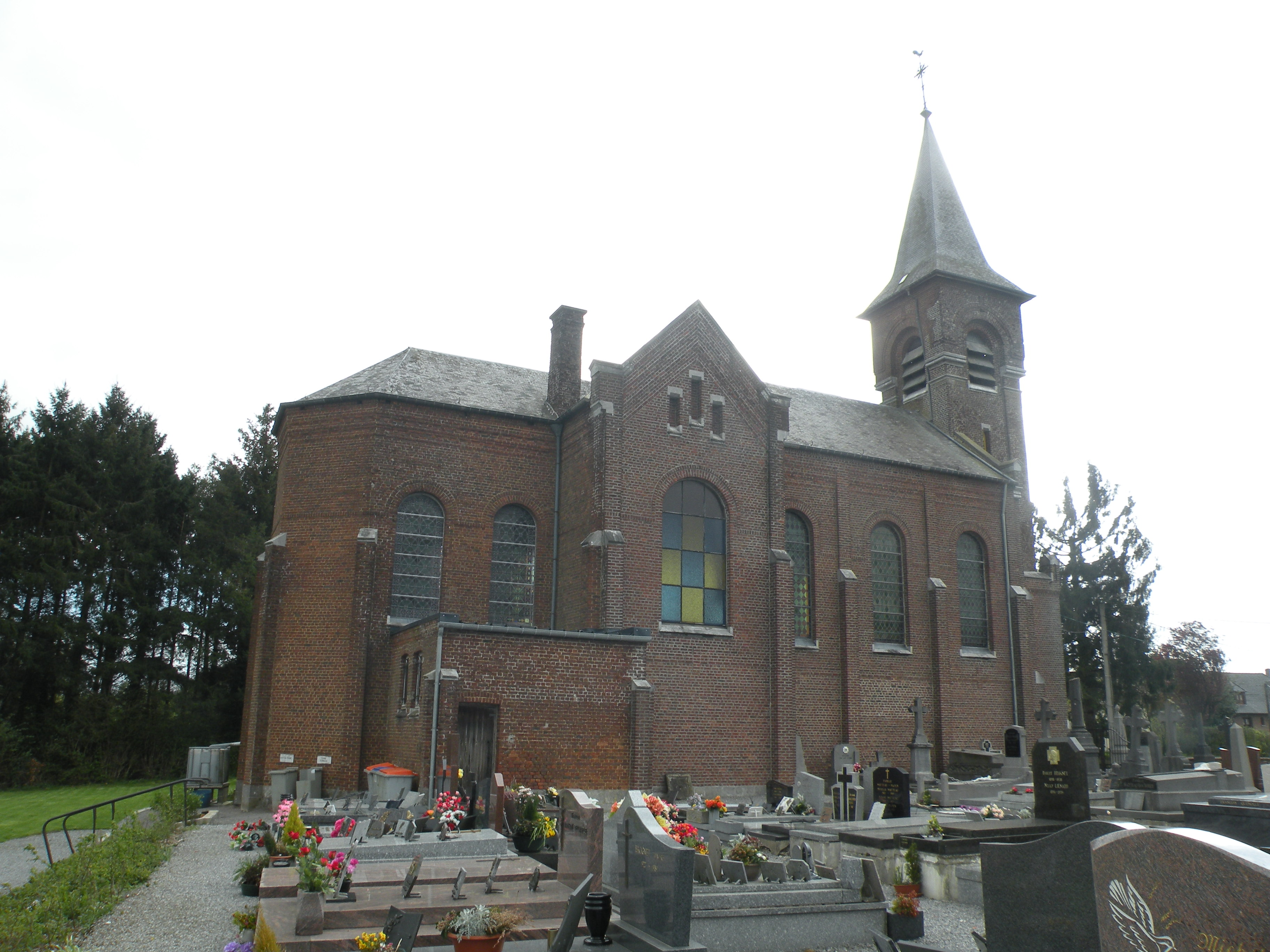 église Saint-Martin de Semousies